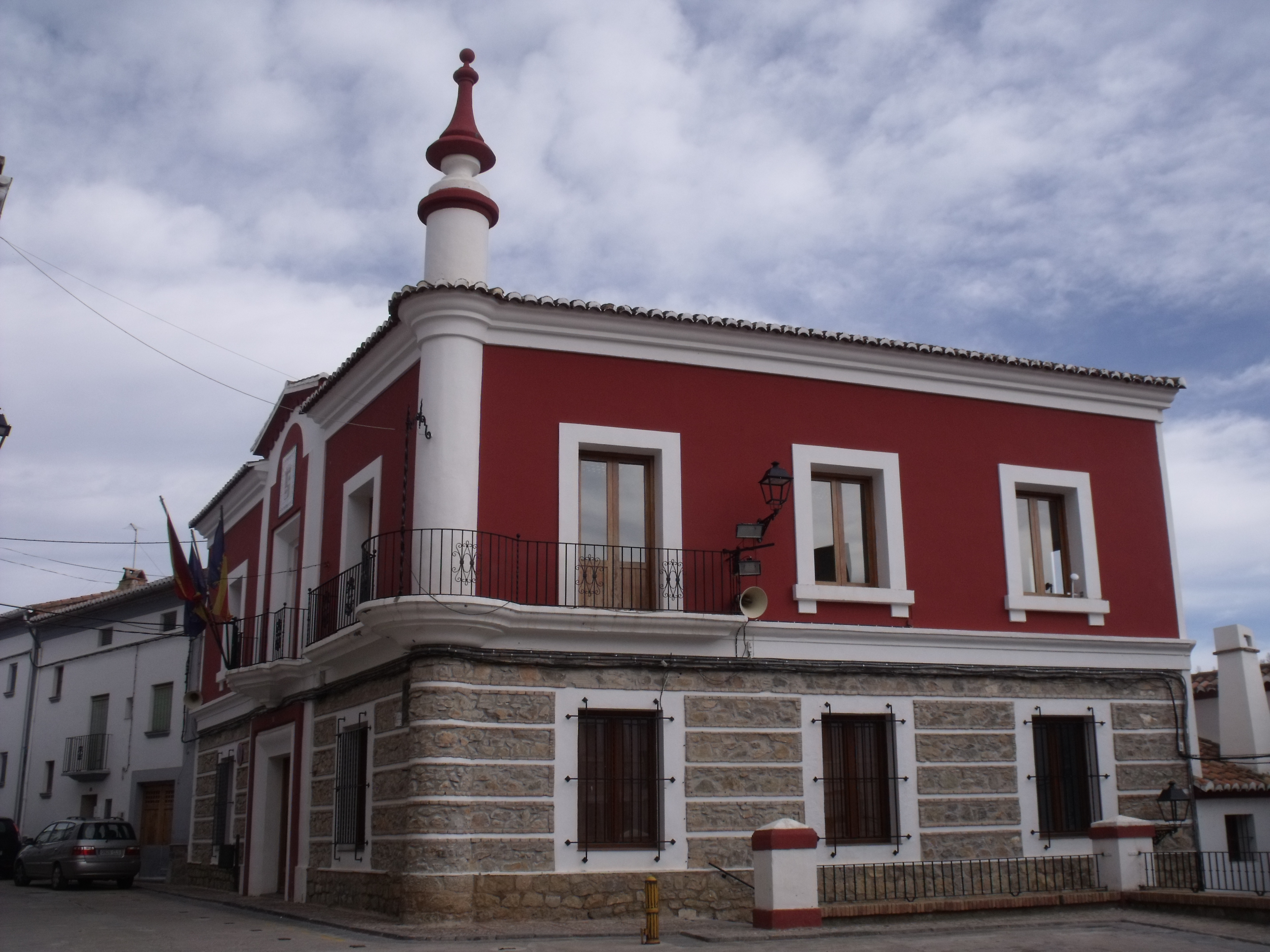 Ayuntamiento